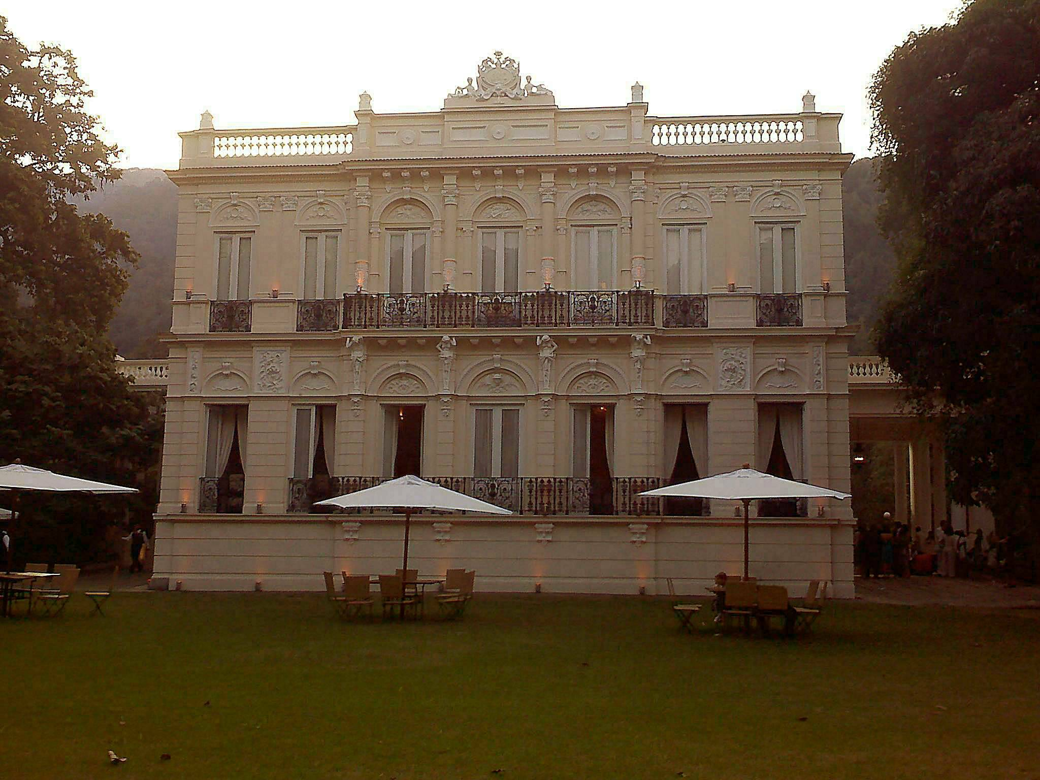 House of Modesto Leal - Rio de Janeiro - Brazil